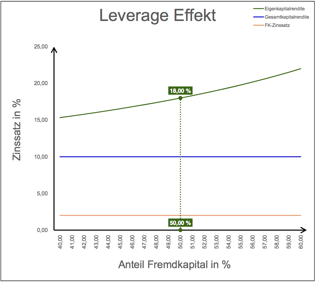 Leverage Effekt